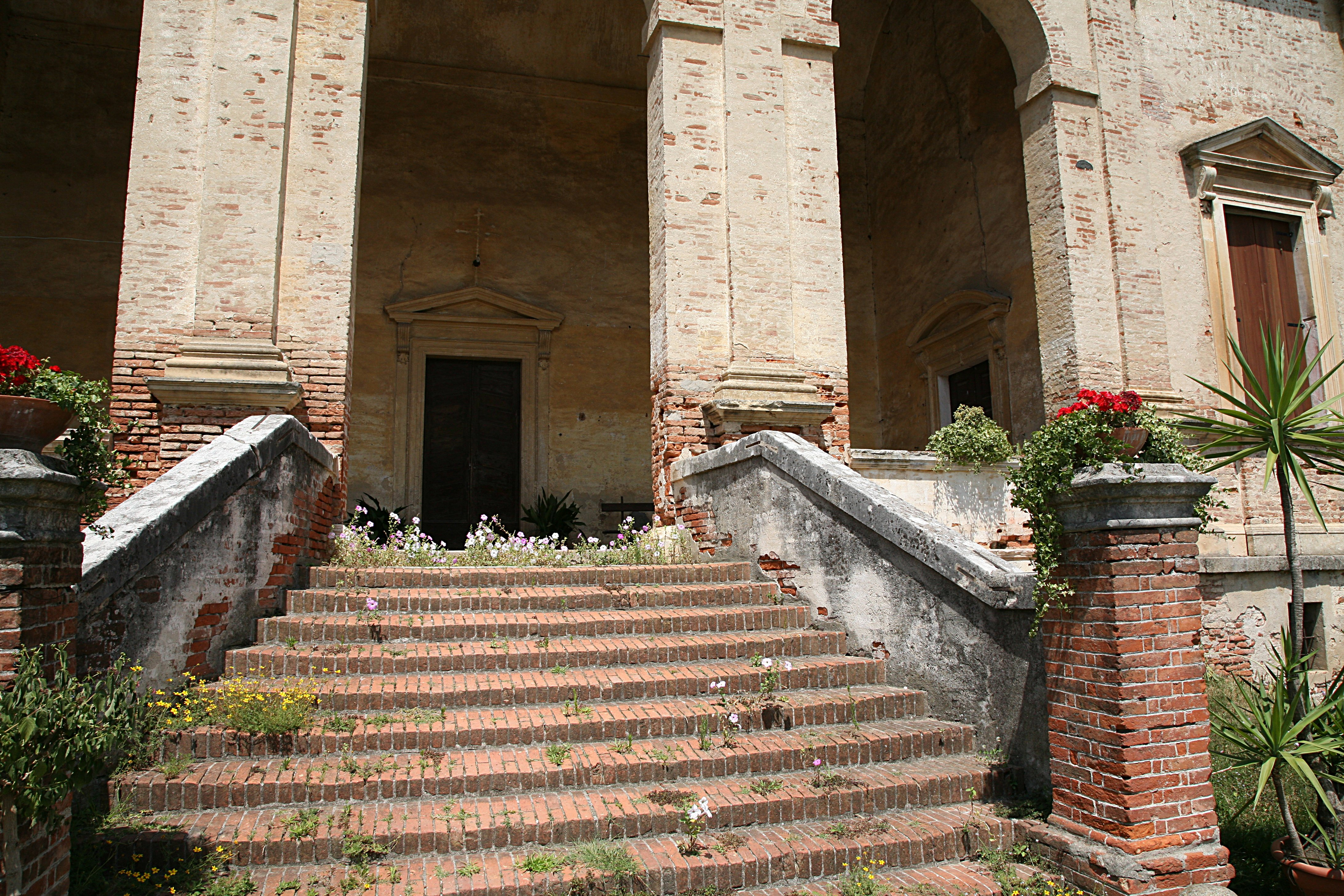 Villa Gazzotti in Bertesina near Vicenza by Andrea Palladio